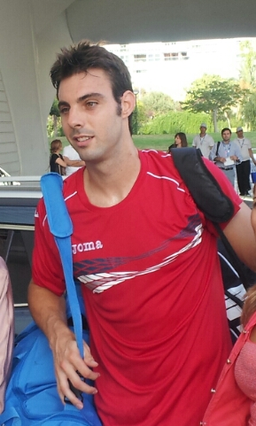 Granollers, després de guanyar el seu primer partit del torneig per la lesió de Tipsarevic.